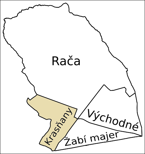 Krasňany, Rača, Bratislava